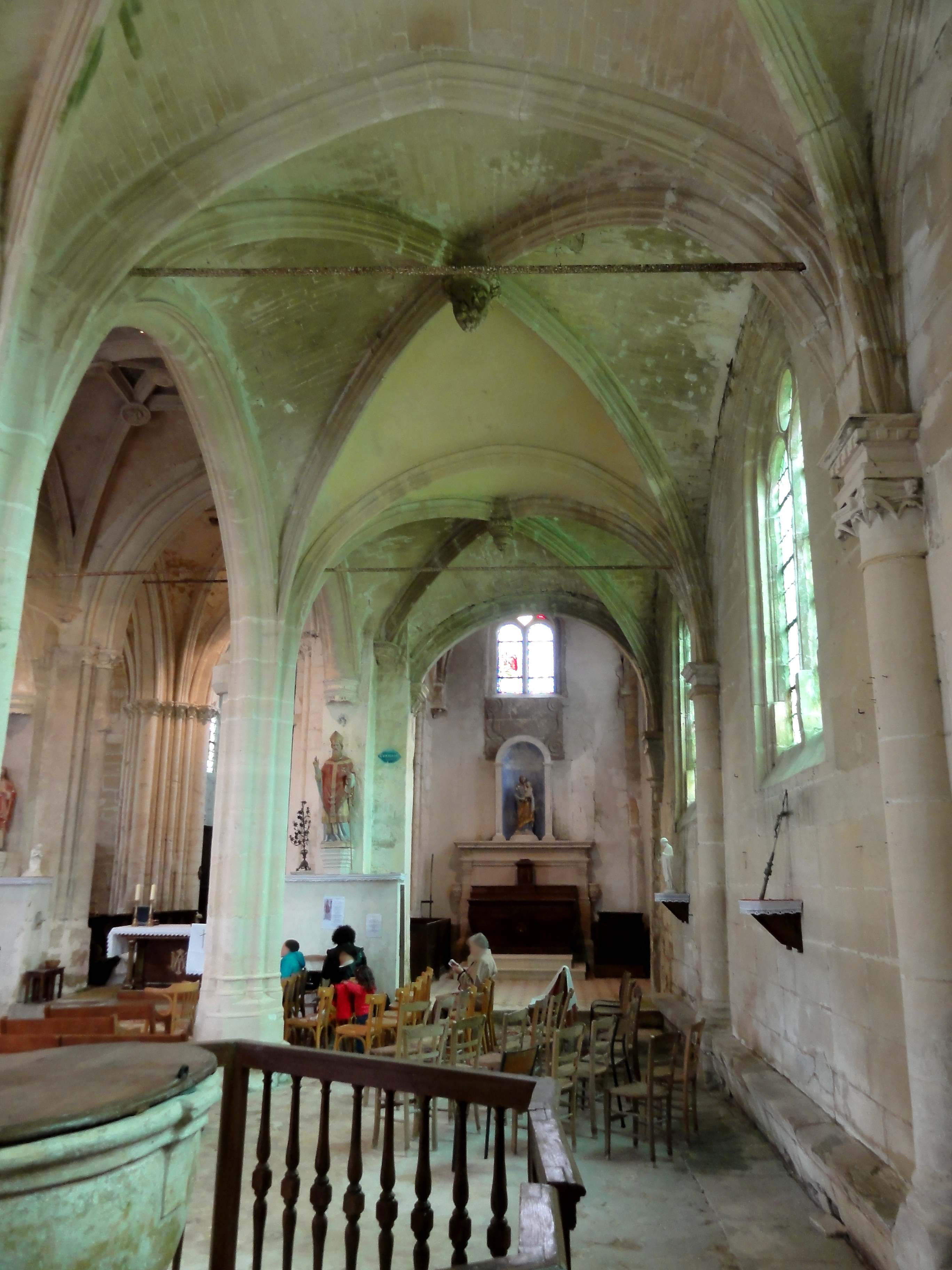 Intérieur de l'église (voir titre).